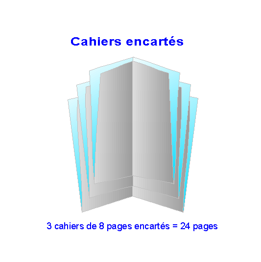 dessin perso libre de droit